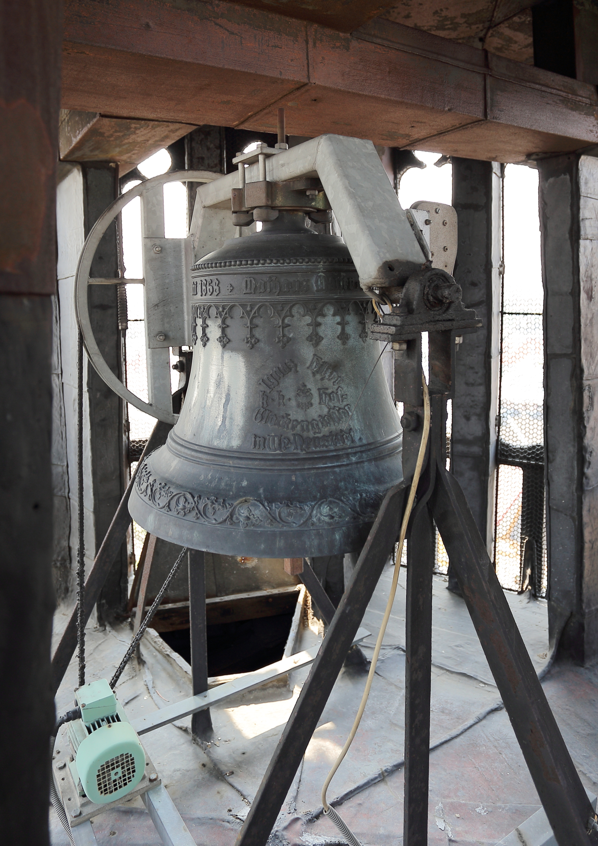 Die sogenannte Totenglocke im Sanktusturm (Vierungsturm) der Othmarkirche im 3. Wiener Gemeindebezirk. 1868 von der Wiener Neustädter Glockengießerei Ignaz Hilzer gegossen.